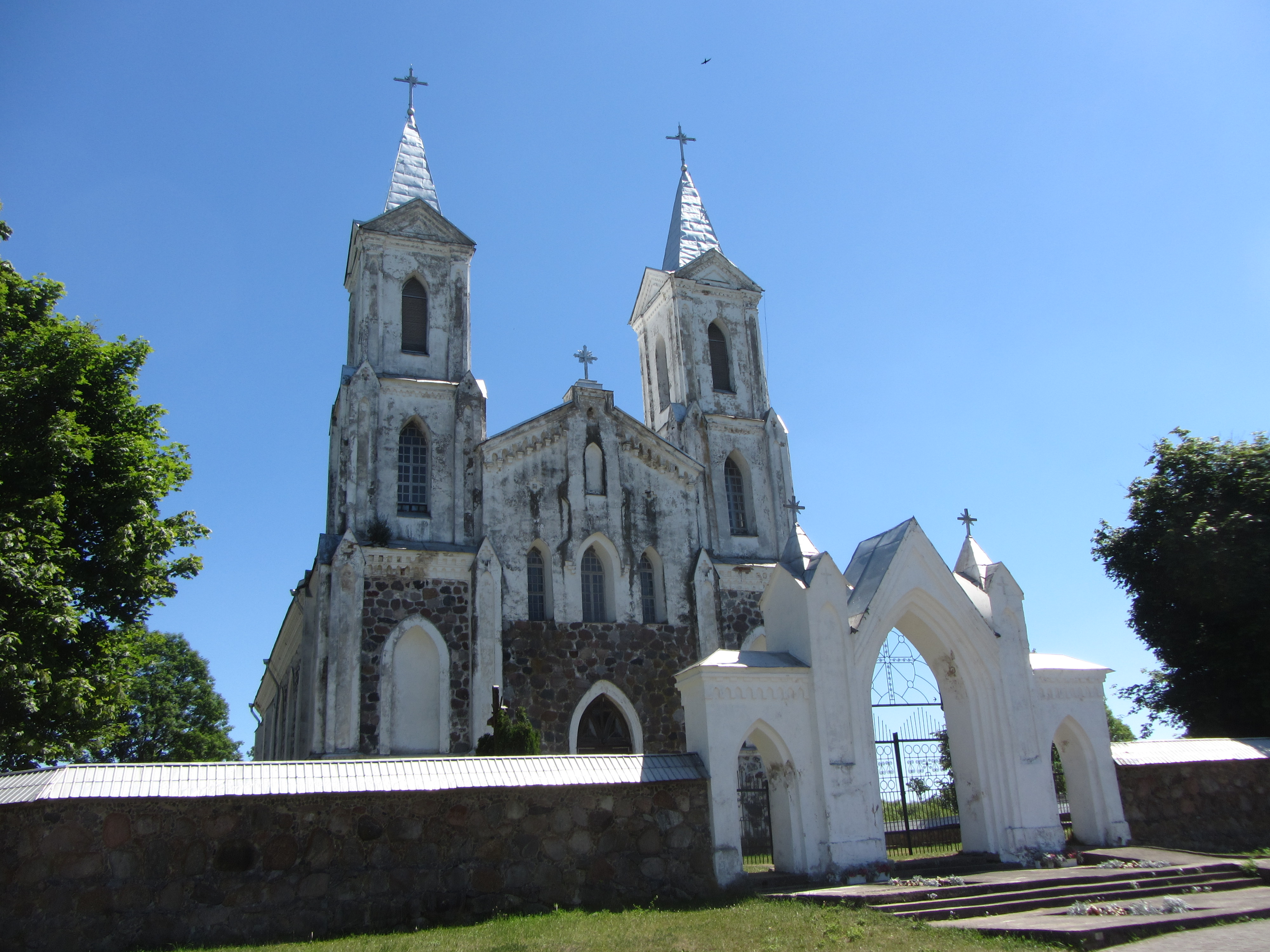 Užuguostis 59367, Lithuania